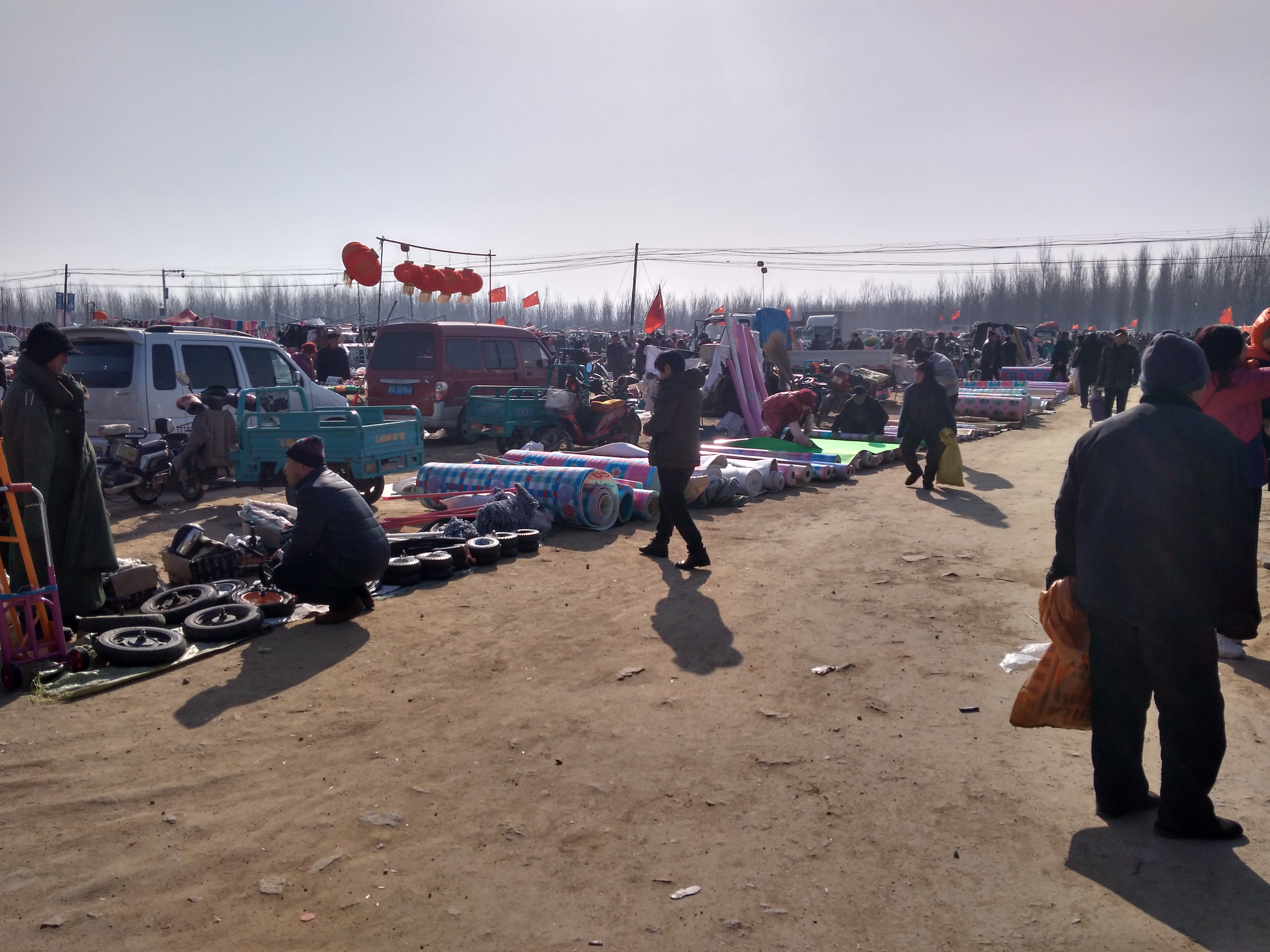 山东省青岛市黄岛区理务关镇的理务关大集